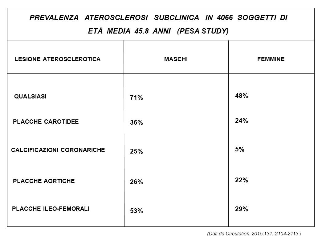 Studio Epidemiologico PESA sulla prevalenza delle lesioni aterosclerotiche